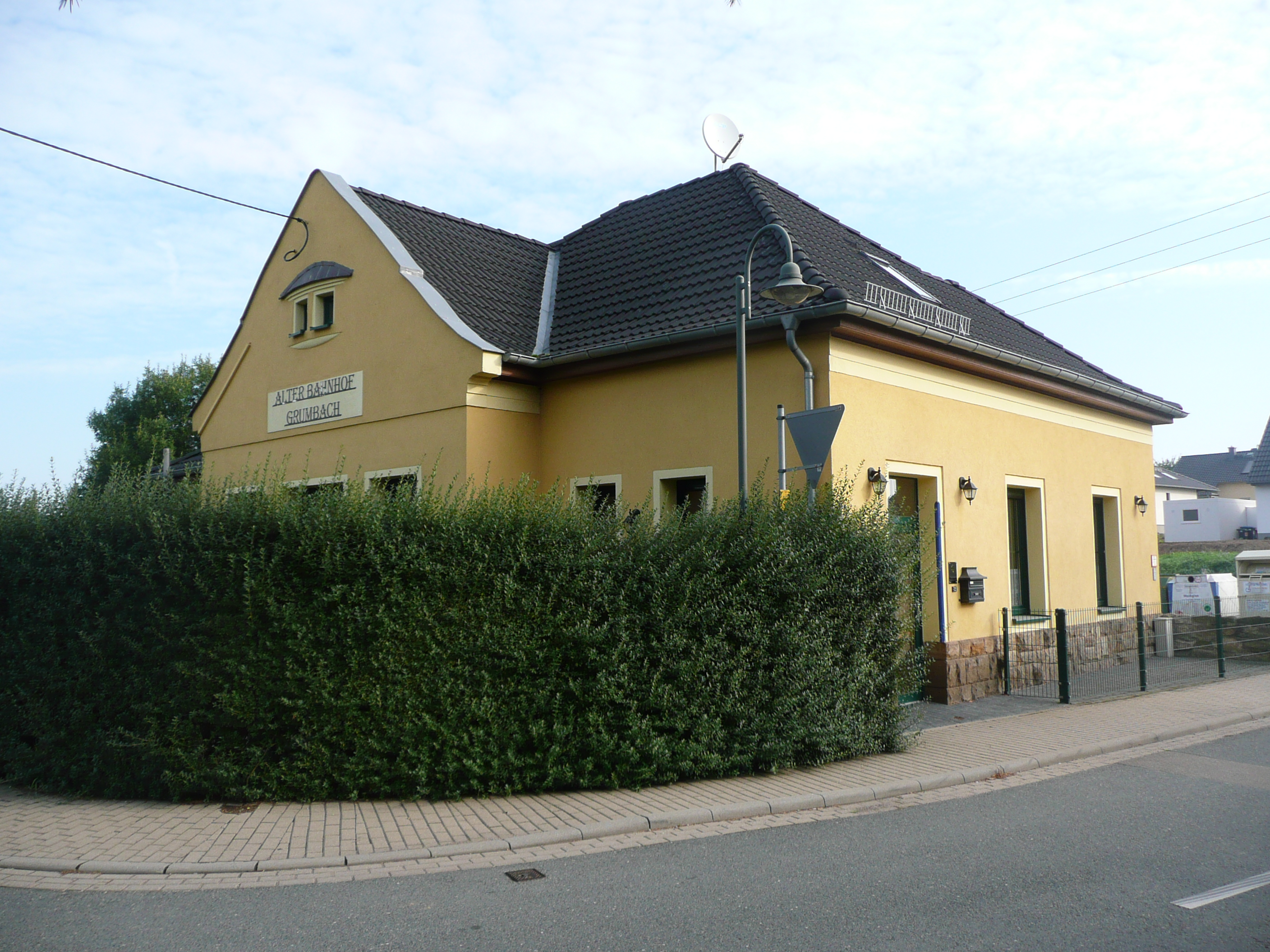 Bahnhofsgebäude des ehemaligen Bahnhofes Grumbach